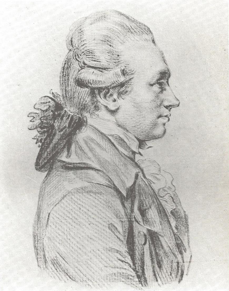 Bildnis Balthasar Anton Dunker (1746-1807).